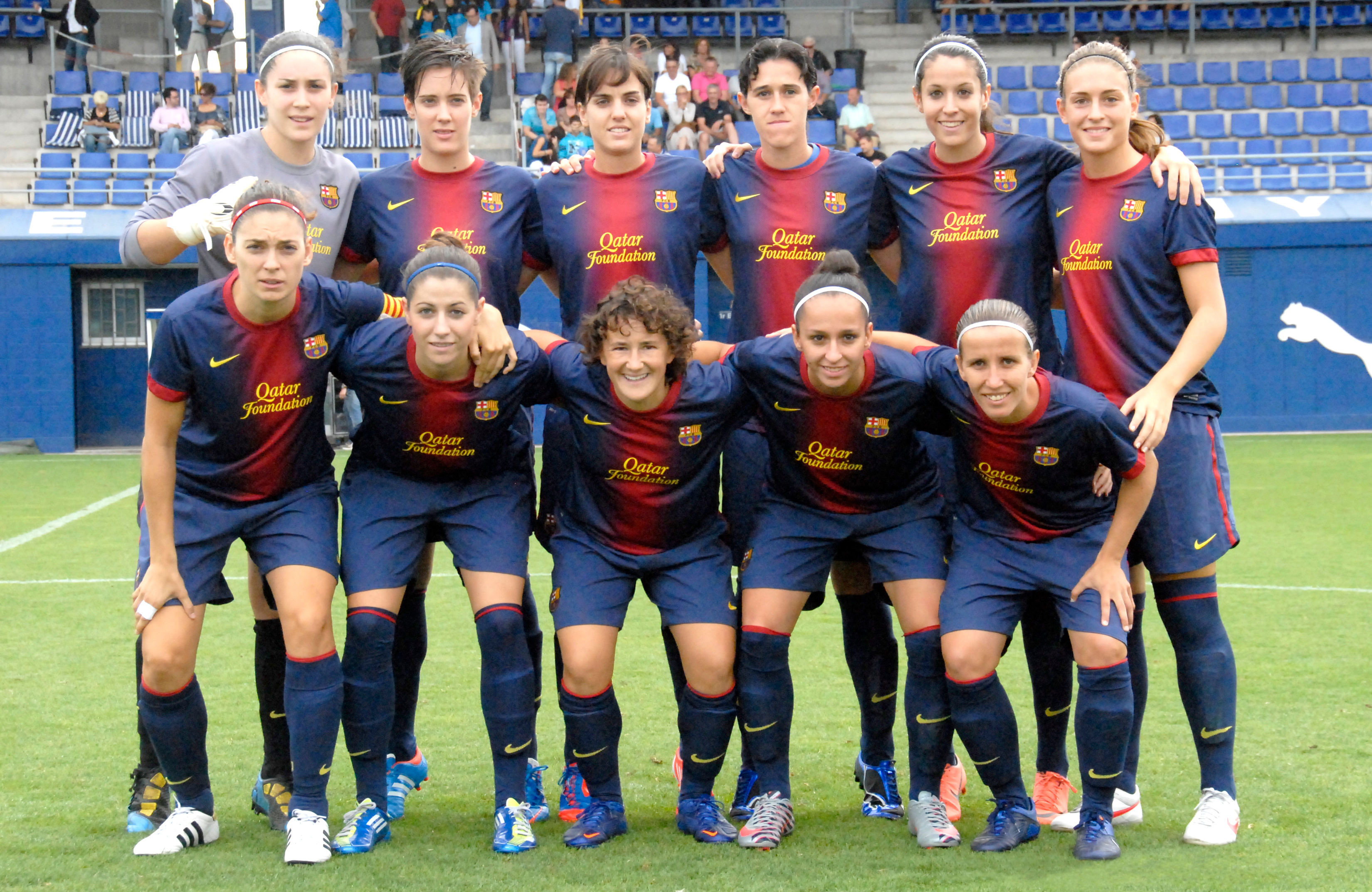 Equip femení del FCB Back row (L-R): Laura Ràfols, Marta Unzué, Melanie Serrano, Miriam Diéguez, Olga García, Alexia Putellas; Front row (L-R): Ana María Escribano, Vicky Losada, Laura Gómez, Marta Corredera, Sonia Bermúdez